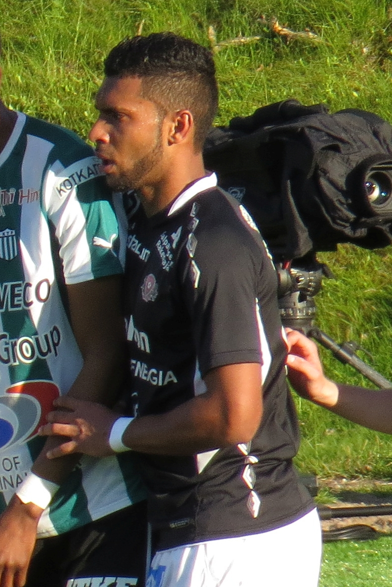 Matheus Alves, brasilialainen jalkapalloilija FC Lahden joukkueessa kaudella 2015.